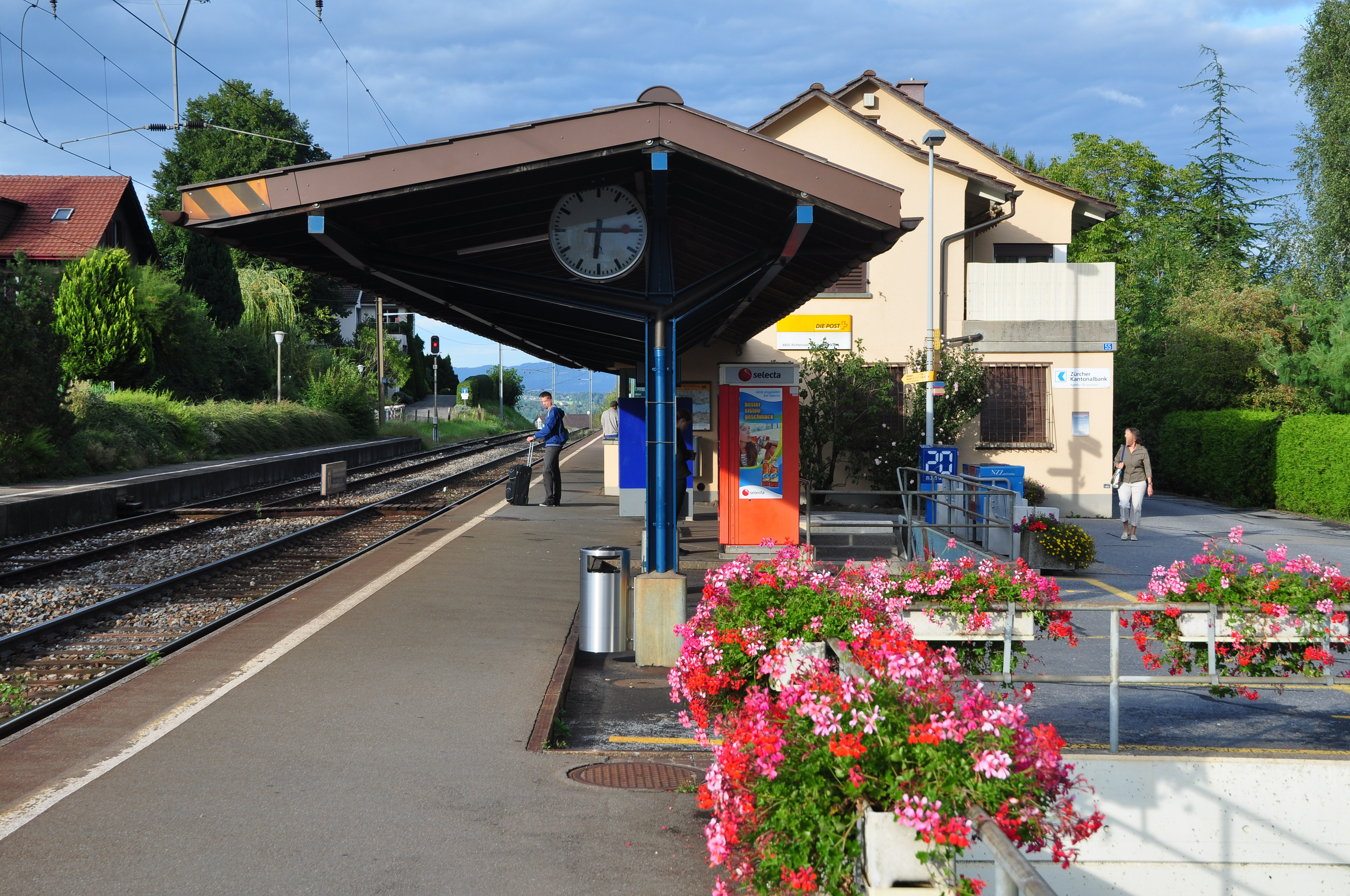 Burghalden in Richterswil (Switzerland)